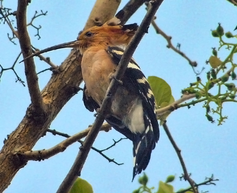 Upupa marginata, Madagascar Hoopoe, Madagascar Wiedehopf. Réserve spéciale de l'Ankarana, Madagascar.